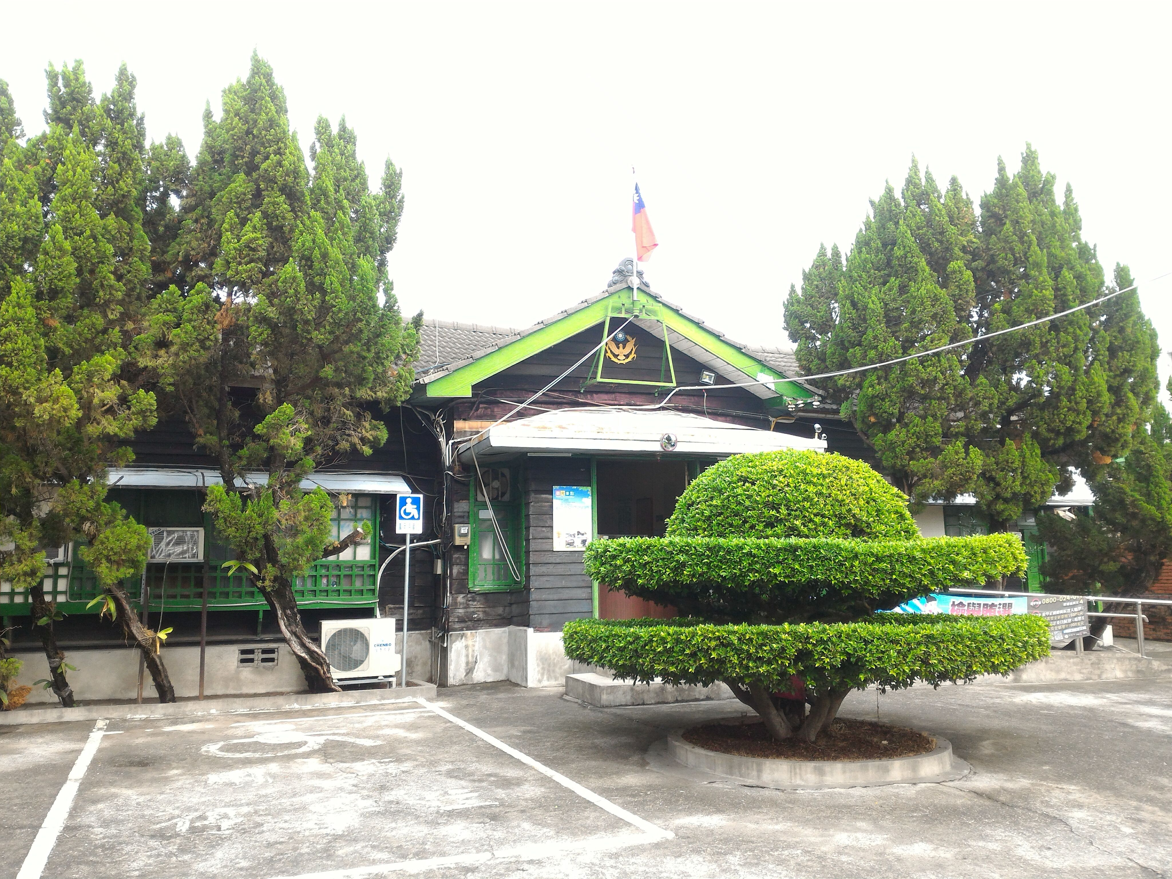 歷史